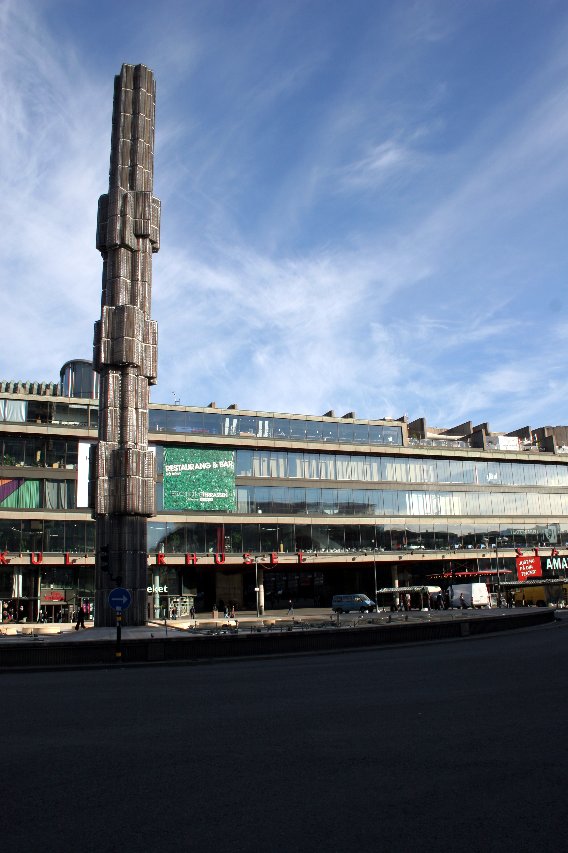 Kulturhuset, Stockholm, Sweden. View from Klarabergsgatan/Sveavägen.